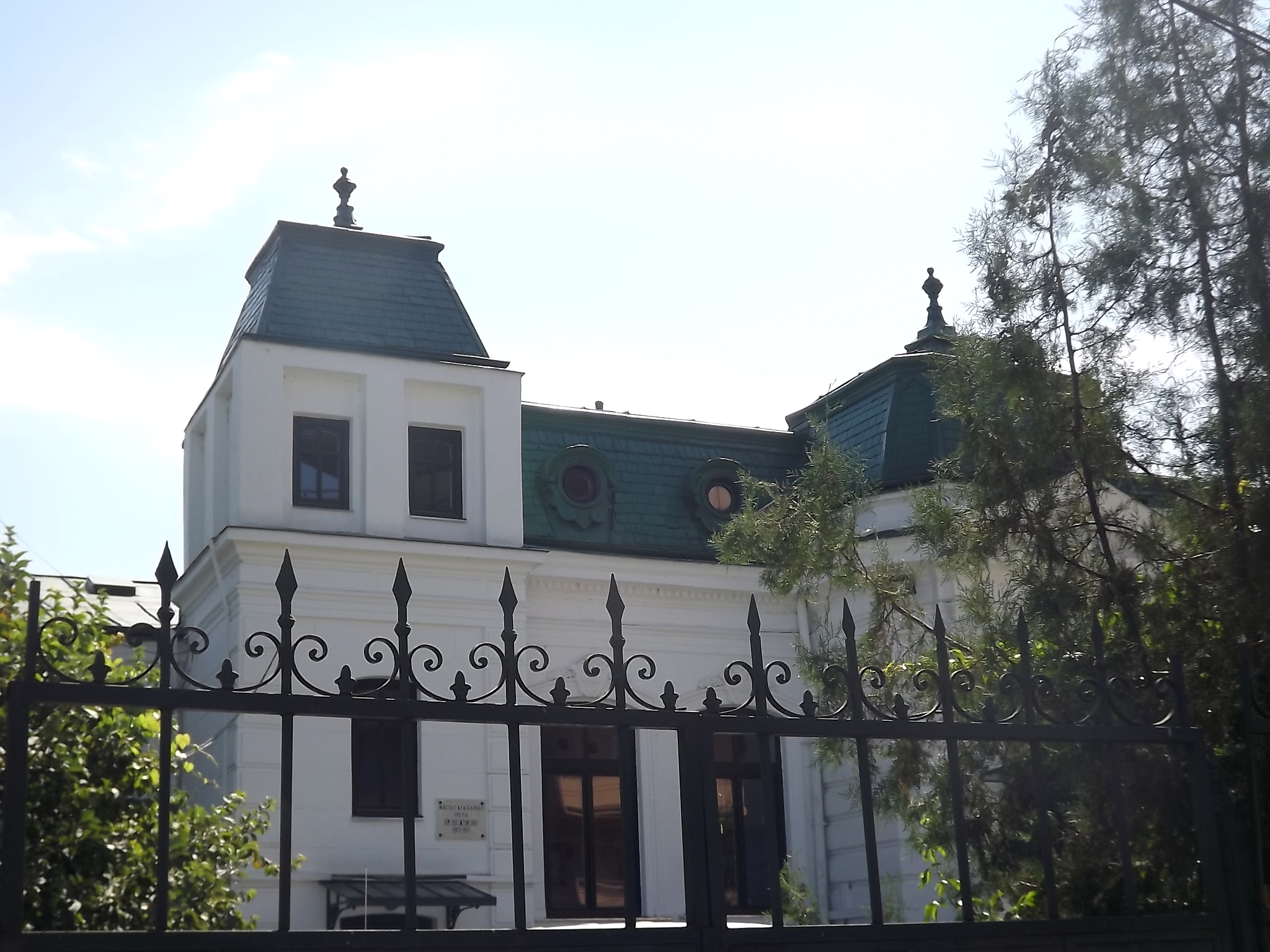 Casa Dimitrie Bolintineanu